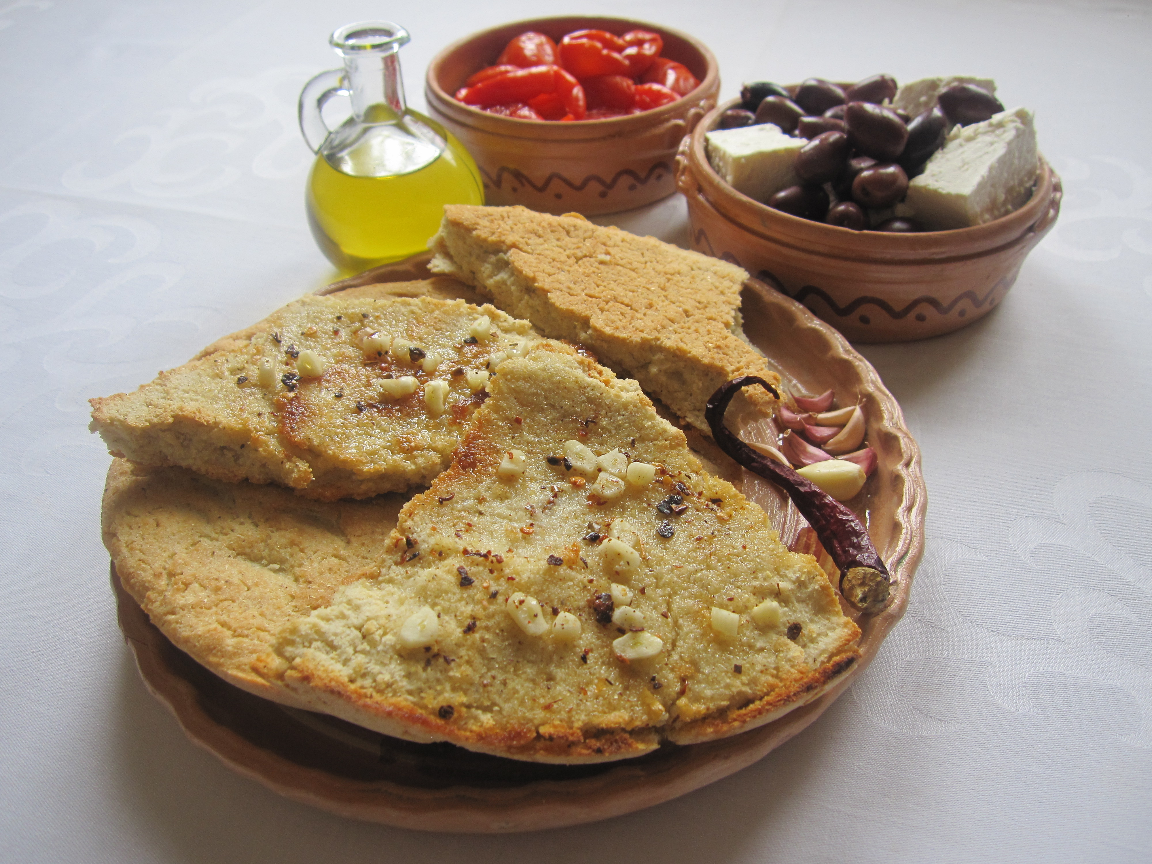 Buka e kollomojtë ose bukë misri është njëra nga gatimet më të vjetra në kuzhinën shqiptare.